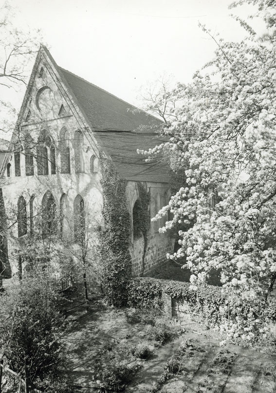 Die St. Petrikapelle von Osten nach einer alten Aufnahme